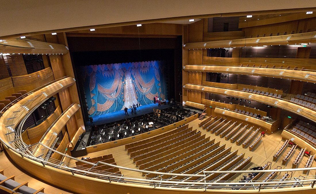 Открытие Новой сцены Мариинского театра